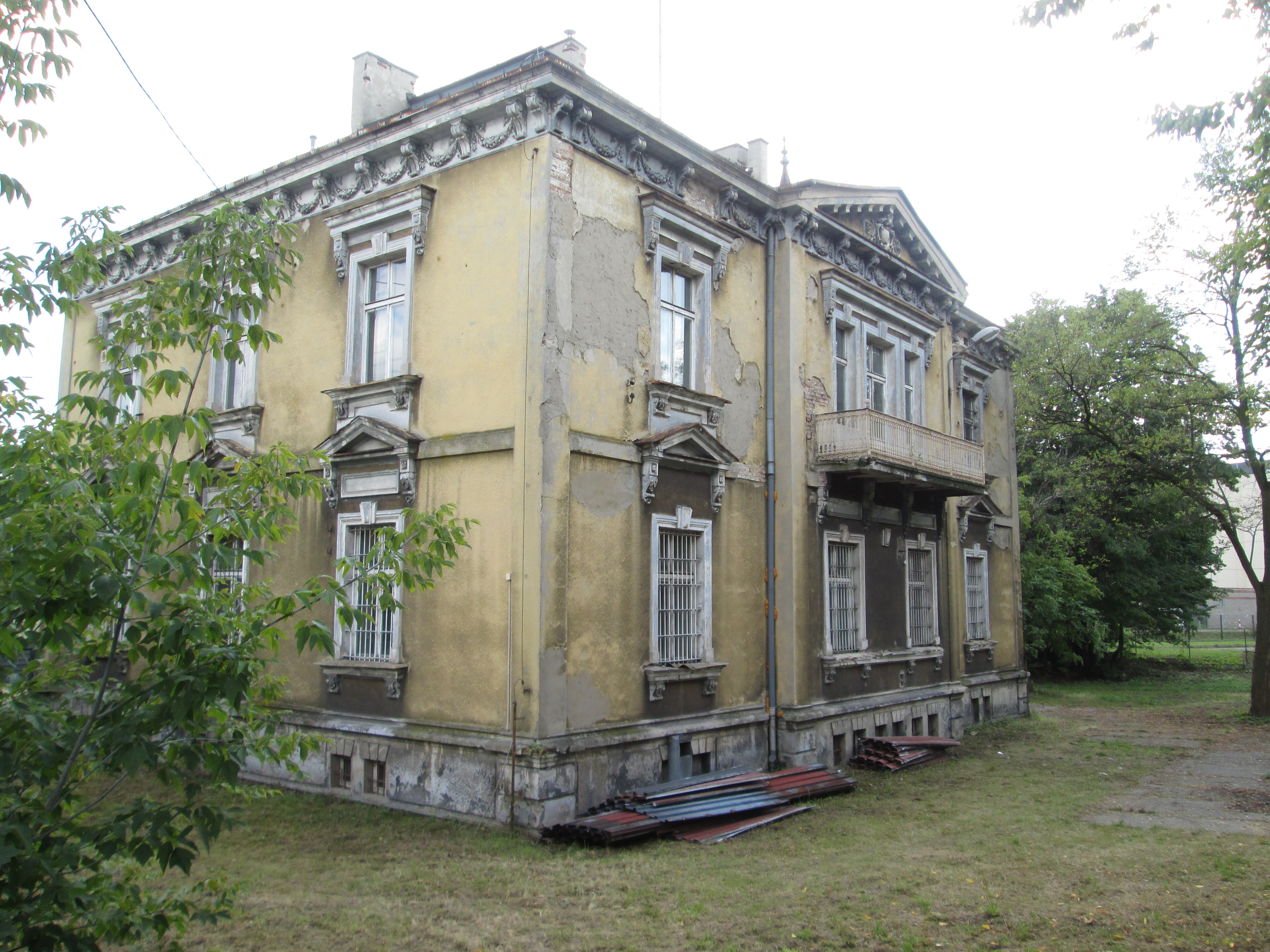 Częstochowa, zespół pałacyku, 1897